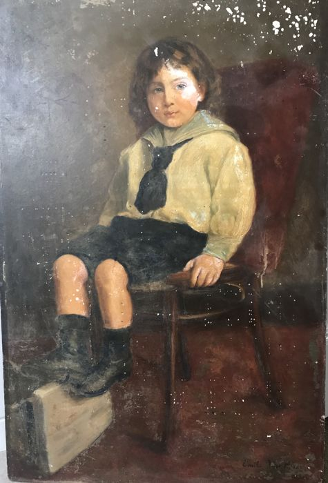 Emile Vauthier Kinderporträt um 1900